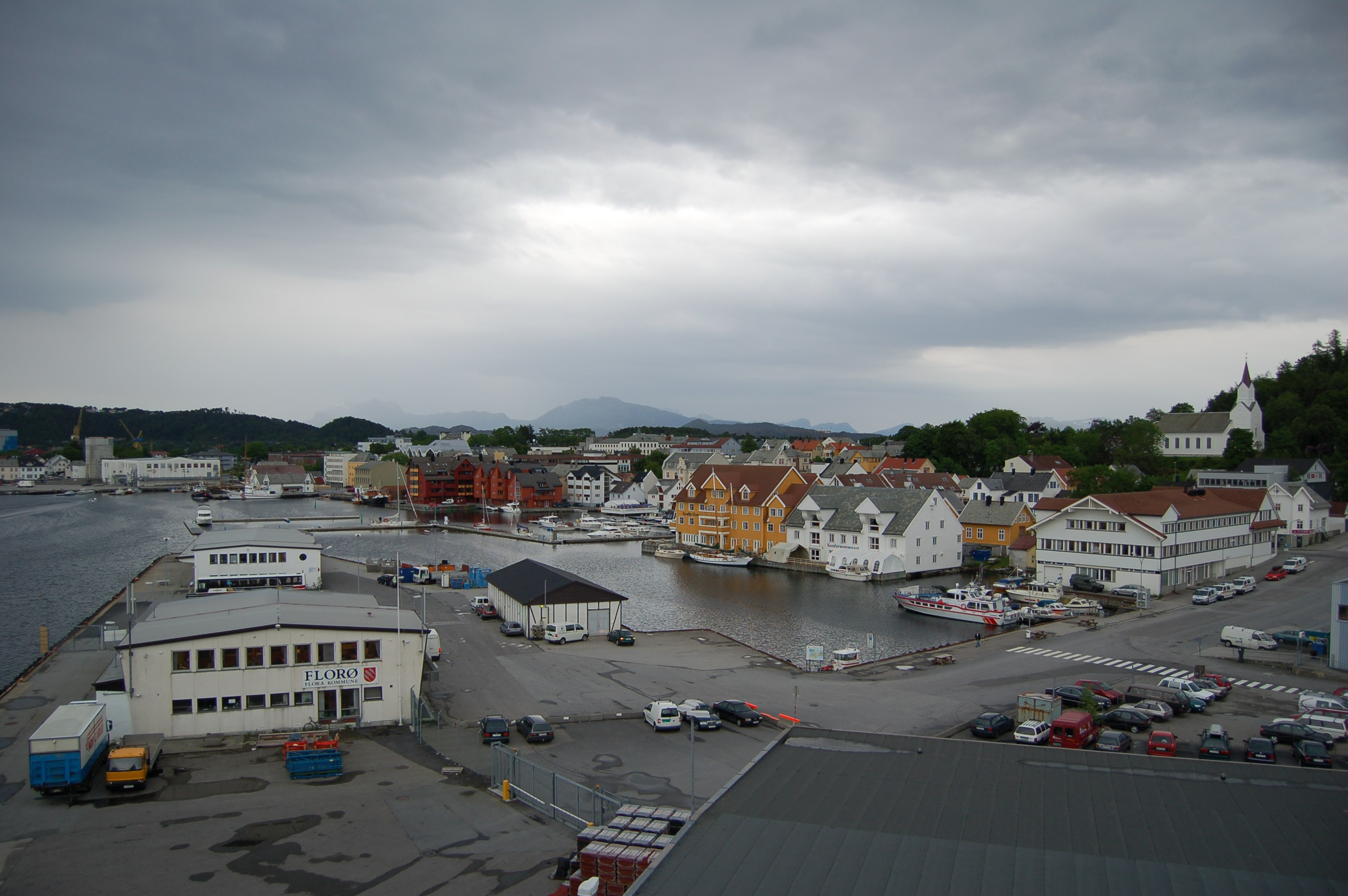 Florø seen from harbour